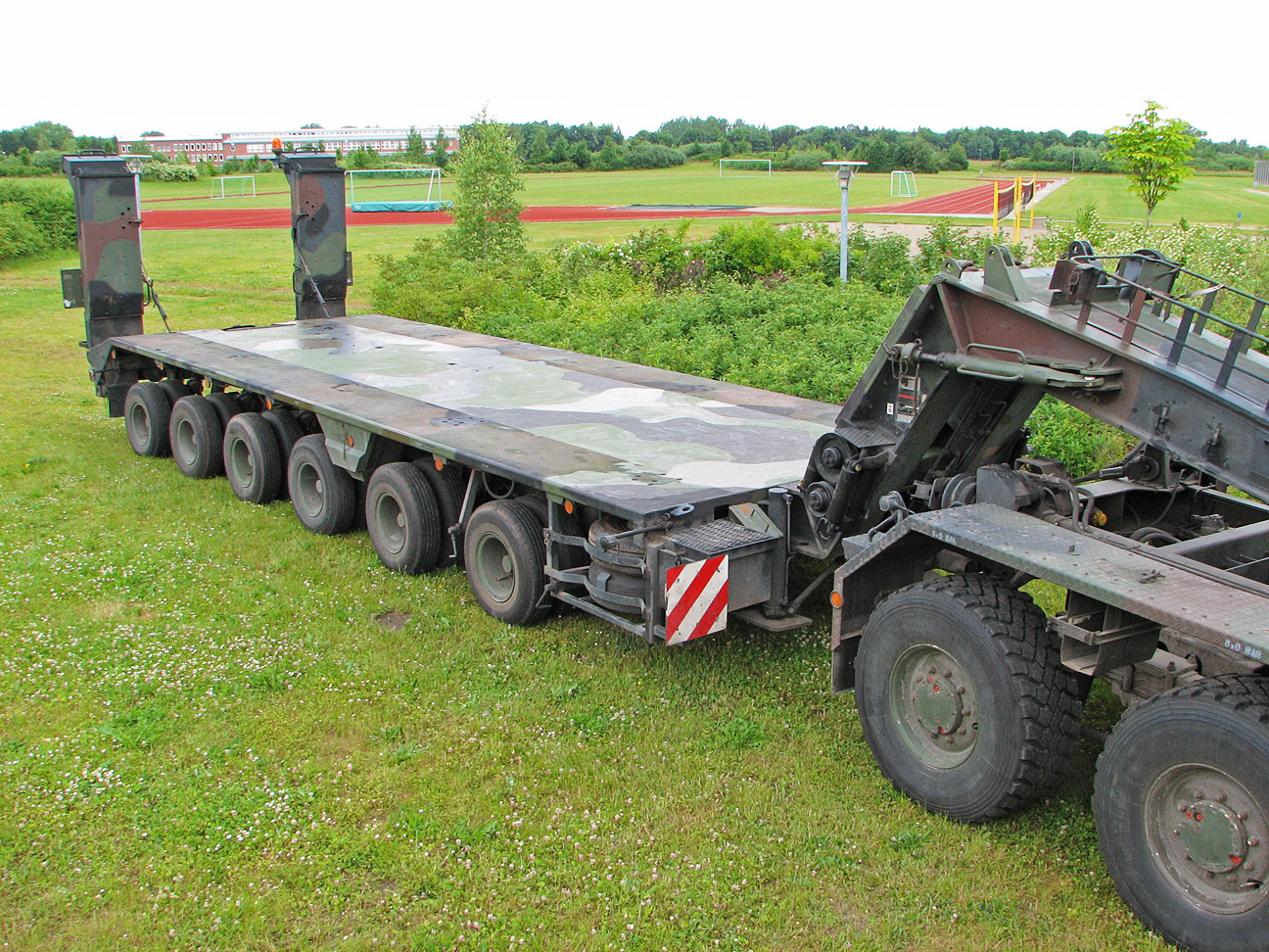 Dieses Bild zeigt den Auflieger eines Schwerlasttransporters SLT Franziska, mitverantwortlich für den Transport eines Leopard 2A6.